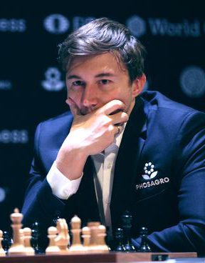 Сергей Карякин, Турнир Претендентов 2018